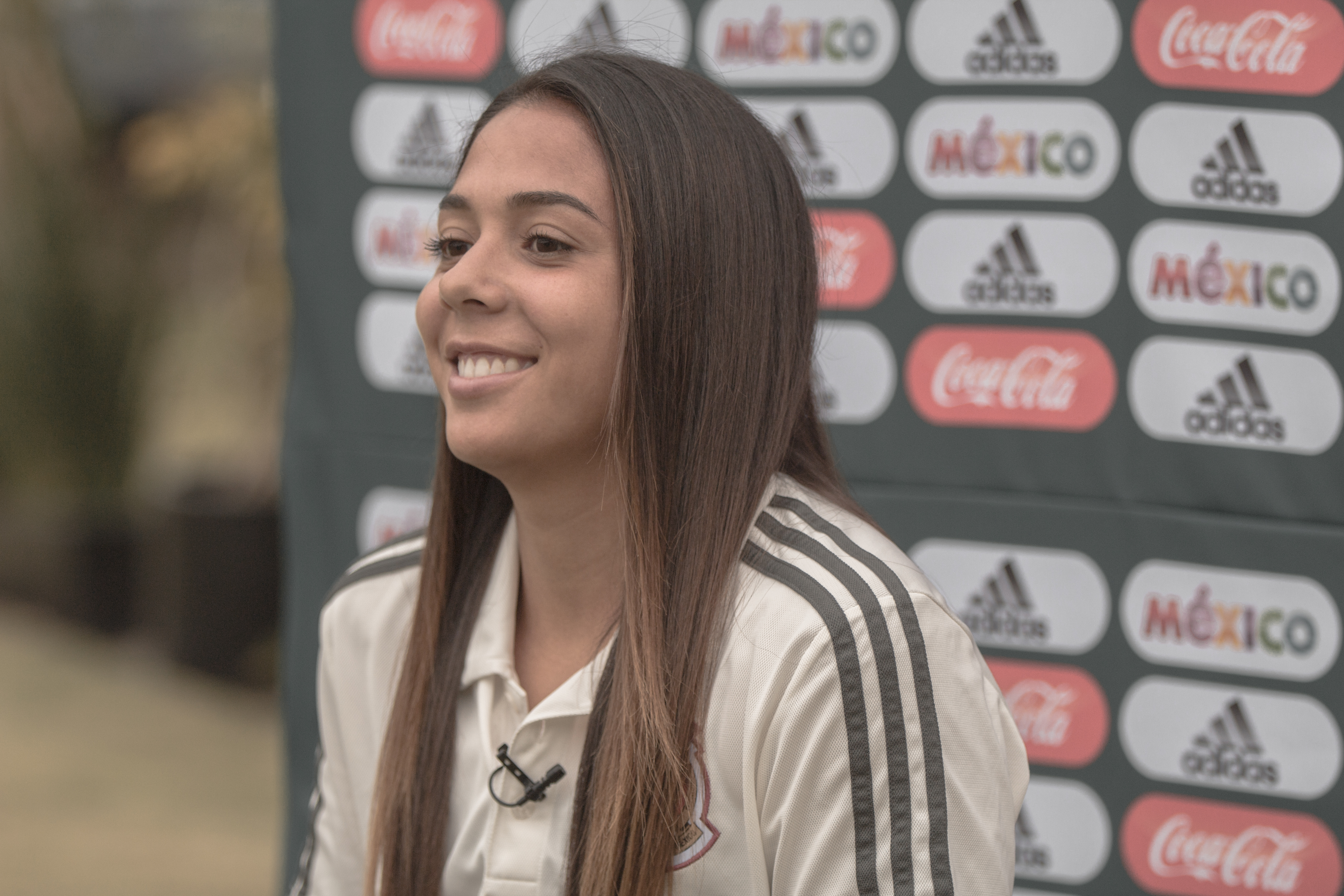 María Sánchez, jugadora de futbol mexicana, integrante de la Selección Femenil de Futbol de México.